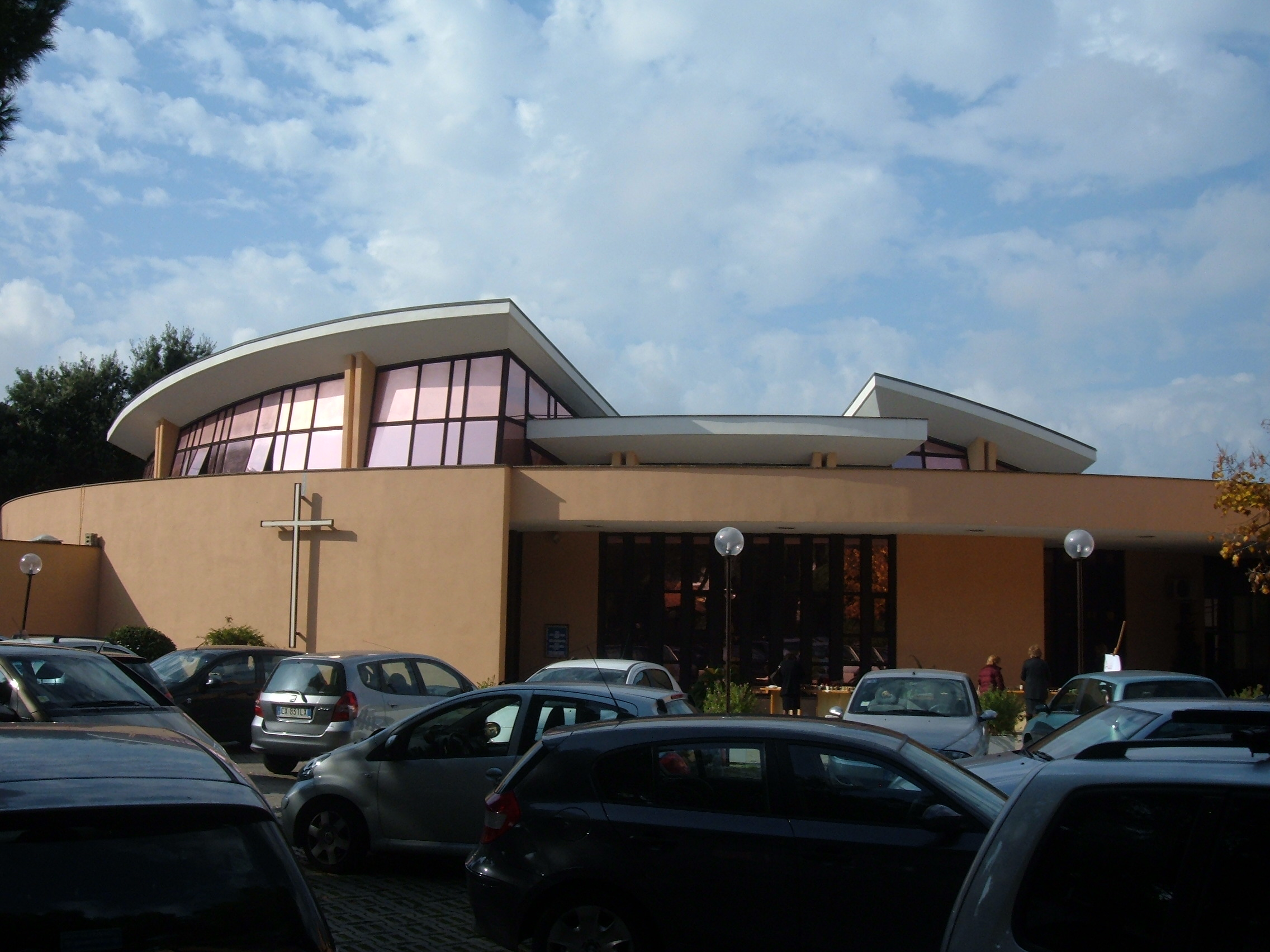 Chiesa parrocchiale di San Gabriele arcangelo, a Roma, nel suburbio Della Vittoria, in via Cortina d'Ampezzo.